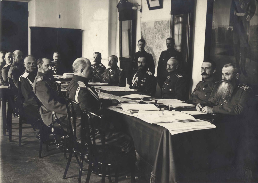 Заседание Ставки Верховного Главнокомандующего. Могилев. 1 апр.1916